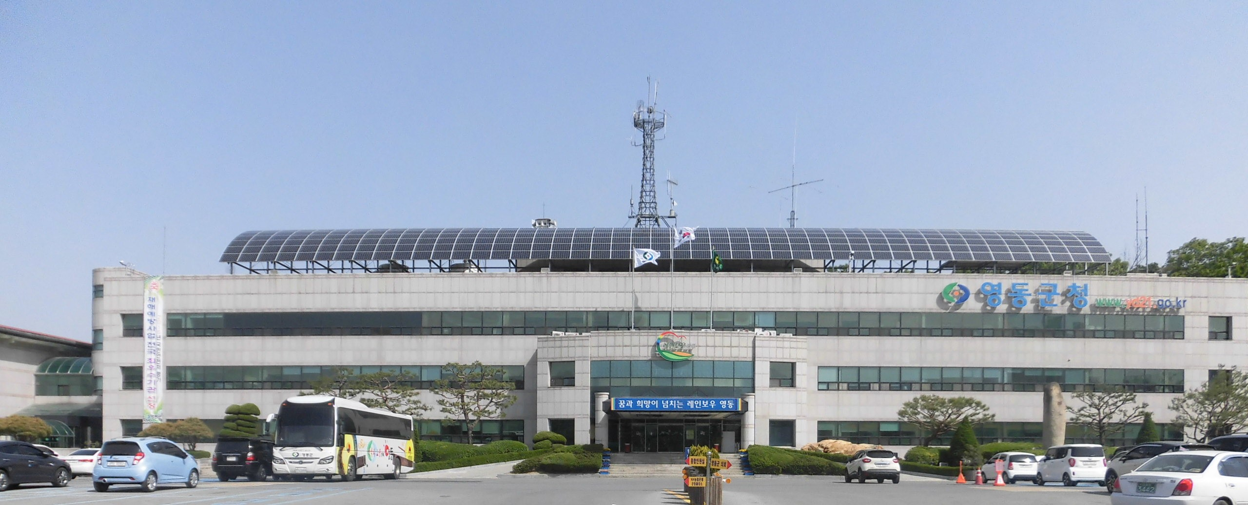 충청북도 영동군에 있는 영동군청